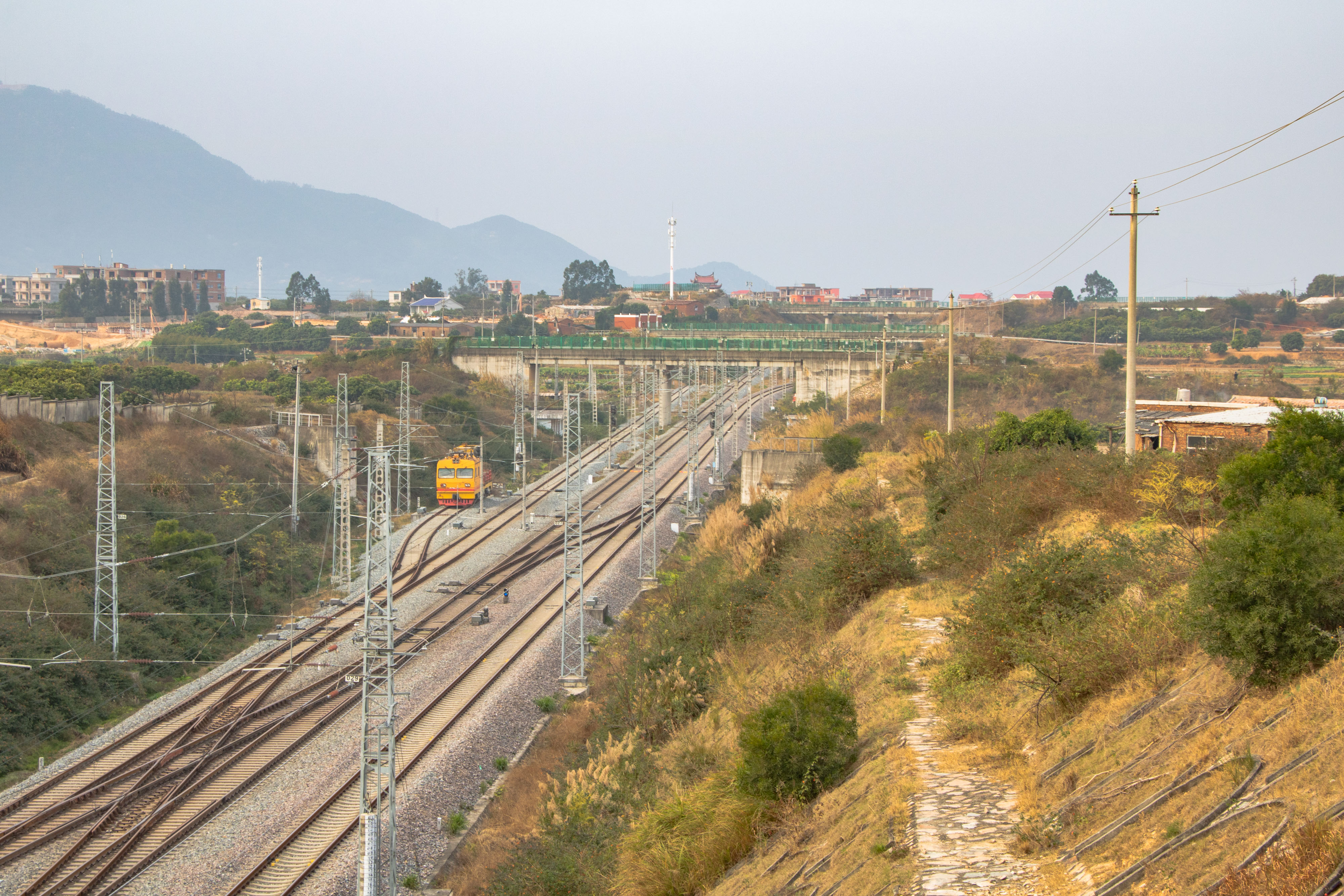 中文（中国大陆）: 东吴线莆田东-莆田区间